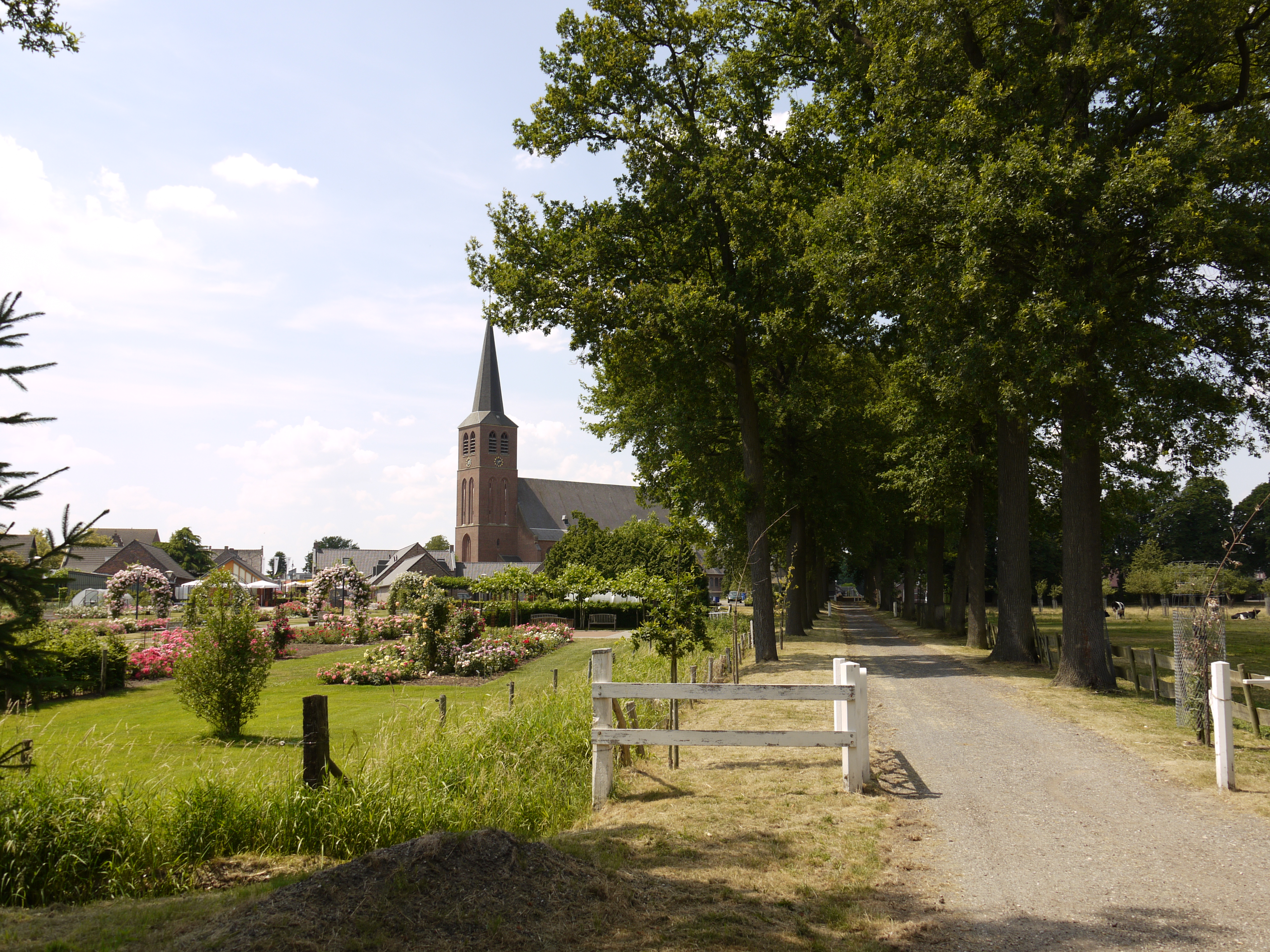 Drive way of De Borggraaf, a castle in Lottum, Horst aan de Maas.